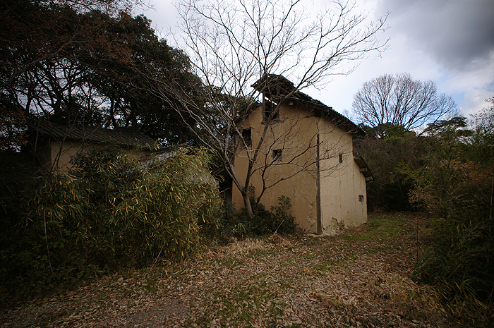 香川県三豊市高瀬町上勝間のベーハ小屋。（現存せず）